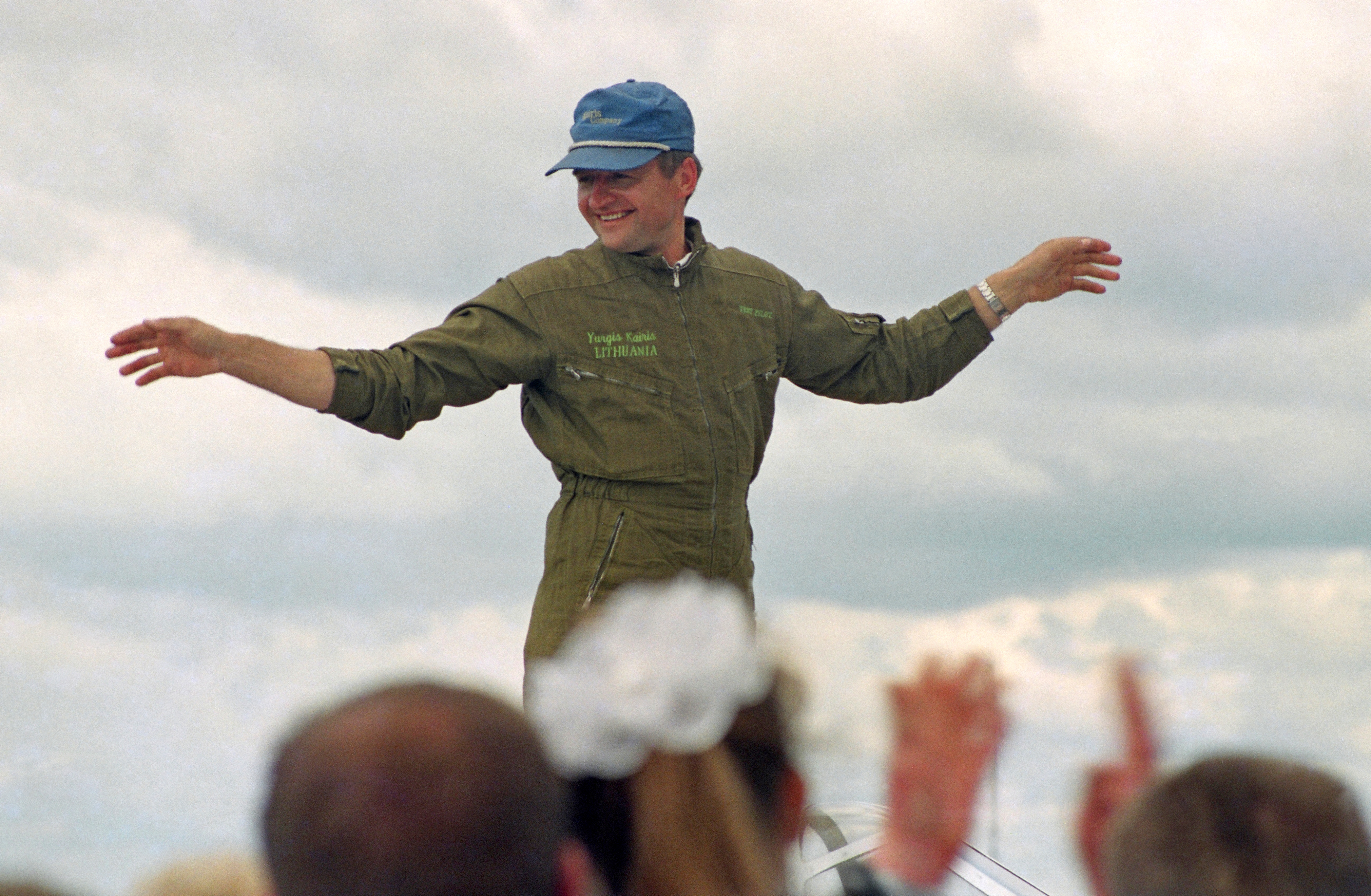 Přivítání Jurgise Kairyse